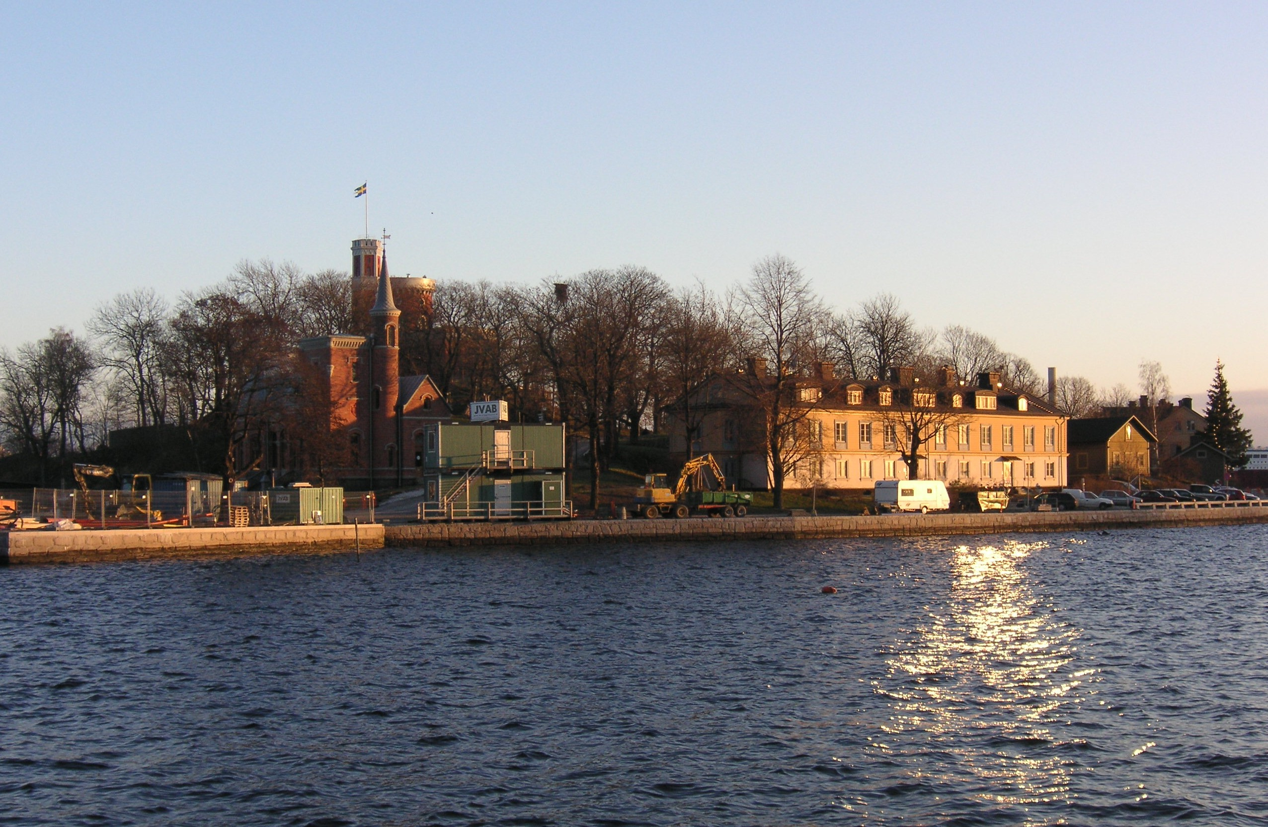 Kastellholmen in Stockholm